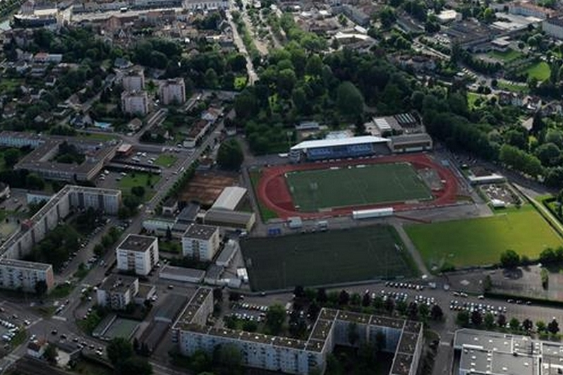 Vesoul quartier du Stade